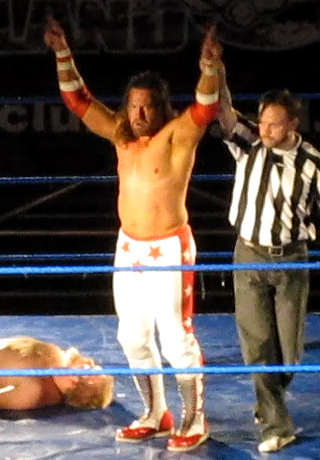 Starbuck